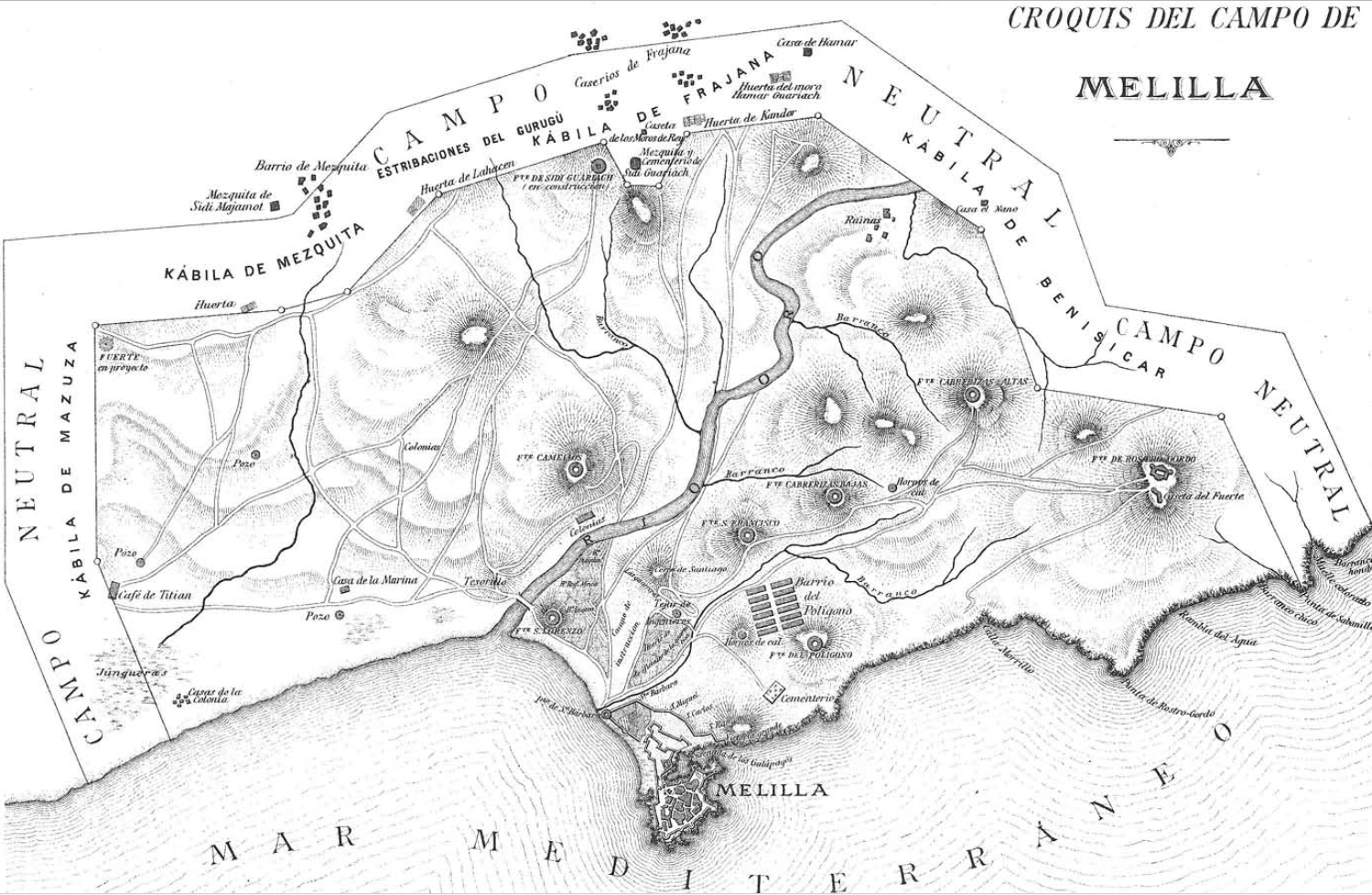 Croquis del campo de Melilla, en la revista española La Ilustración Artística.